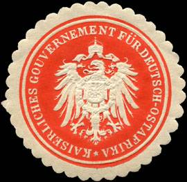 Sealing stamp Title: Kaiserliches Gouvernement für Deutsch - Ostafrika Description: hellrot, weiß, geprägt Place: Daressalam size: 4 cm